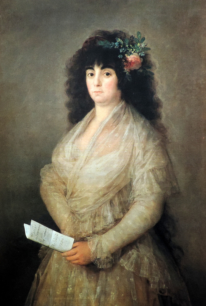 Retrato de Maria del Rosario Fernandez "La Tirana"